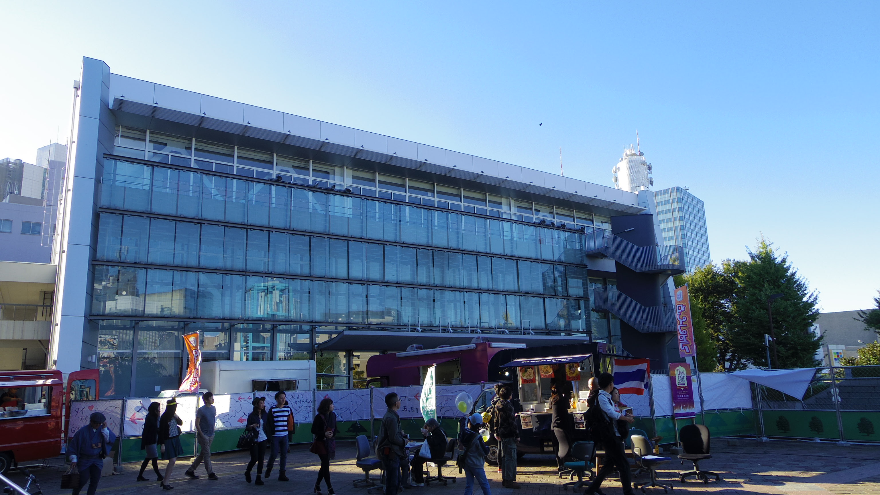 旧渋谷公会堂（東京都渋谷区）。1964年東京オリンピックにて重量挙げの会場として使用された後、様々なコンサート・演劇やテレビ番組（8時だョ!全員集合、ザ・トップテンなど）の公開放送の会場として使用された。一時期のみ命名権により「渋谷C.C.Lemonホール」としたことがある。 2015年11月3日に撮影。当日は旧渋谷区役所および広場にてイベントが開かれていた。